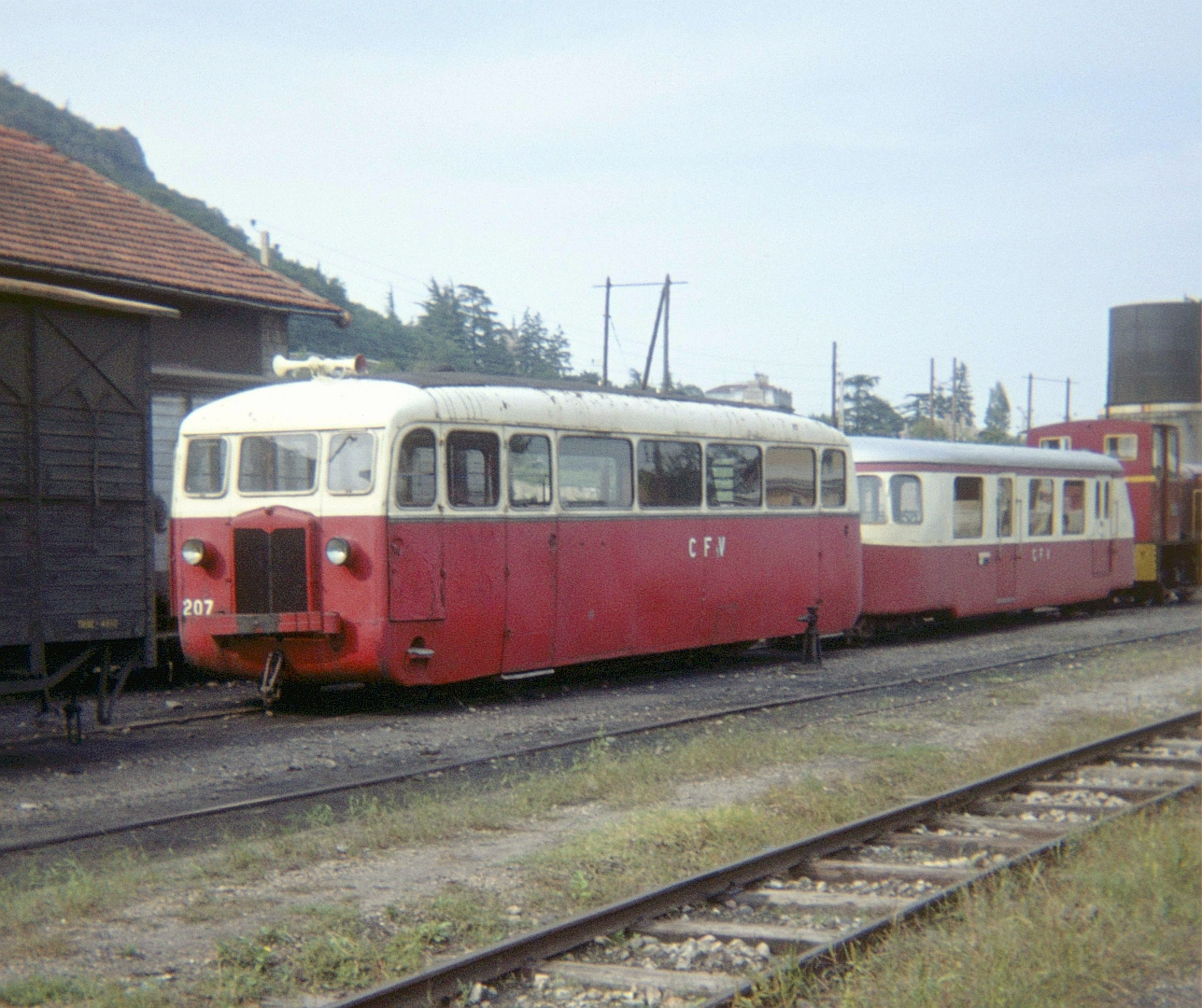 L'autorail De Dion-Bouton ND 207 du chemin de fer du Vivarais, en gare de Tournon-sur-Rhône (Ardèche) le 21 septembre 1975.